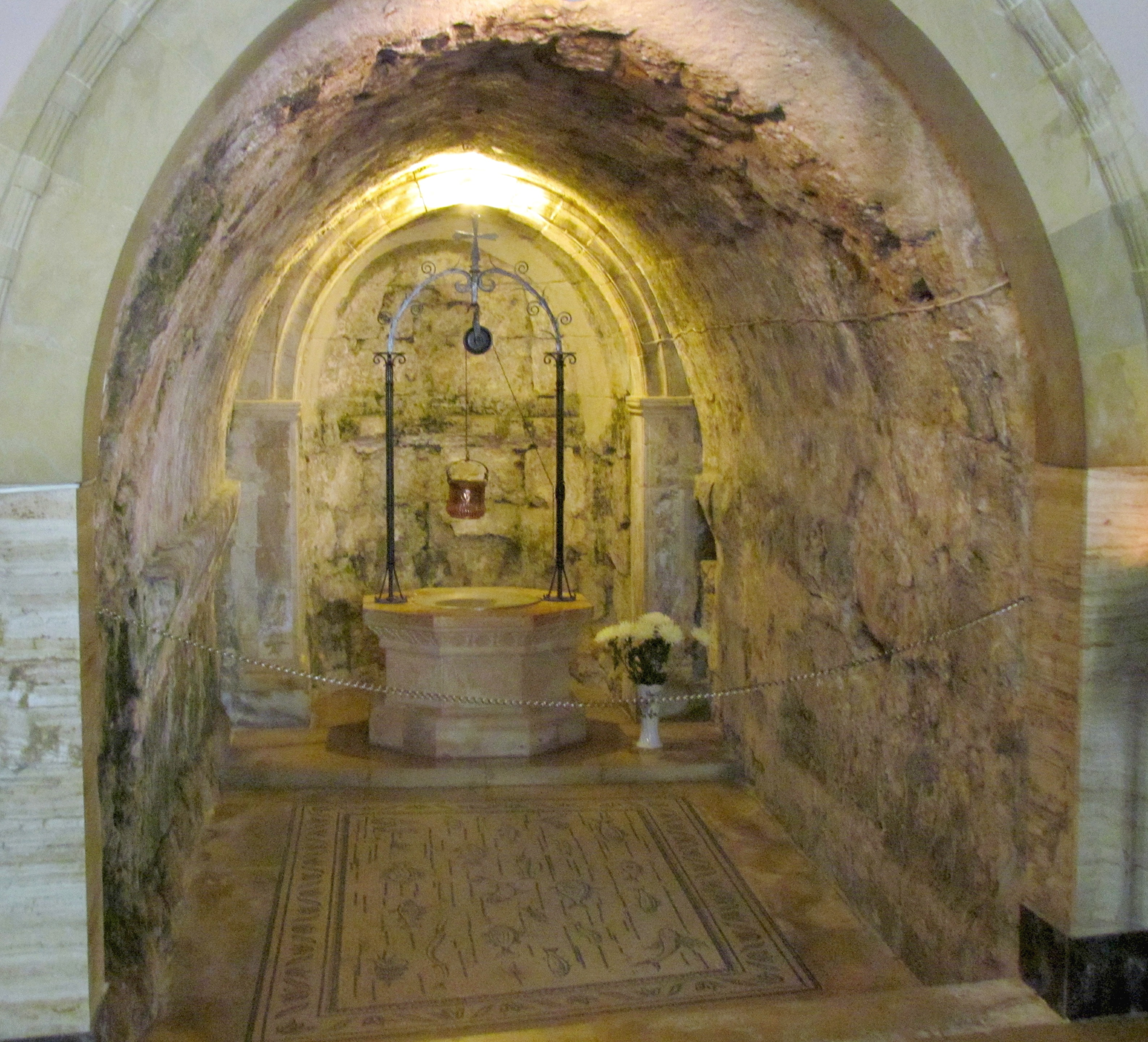 מנזר גורני (או גורננסקי), המוכר גם בשמו הערבי מוסקוביה, הוא מנזר בו מתגוררות נזירות רוסיות אורתודוקסיות. בתחילה שימש כאכסניית צליינים. ב-1911 יזמה הנסיכה אליזבת, אשתו של מושל מוסקבה, את בניית "כנסיית כל הקדושים של רוסיה". בנייתה הופסקה במלחמת העולם ה-I, והתחדשה רק ב-2003. הכנסייה בסגנון רוסי עם צריחי "בצל", וב-2009 כיפותיה צופו זהב.